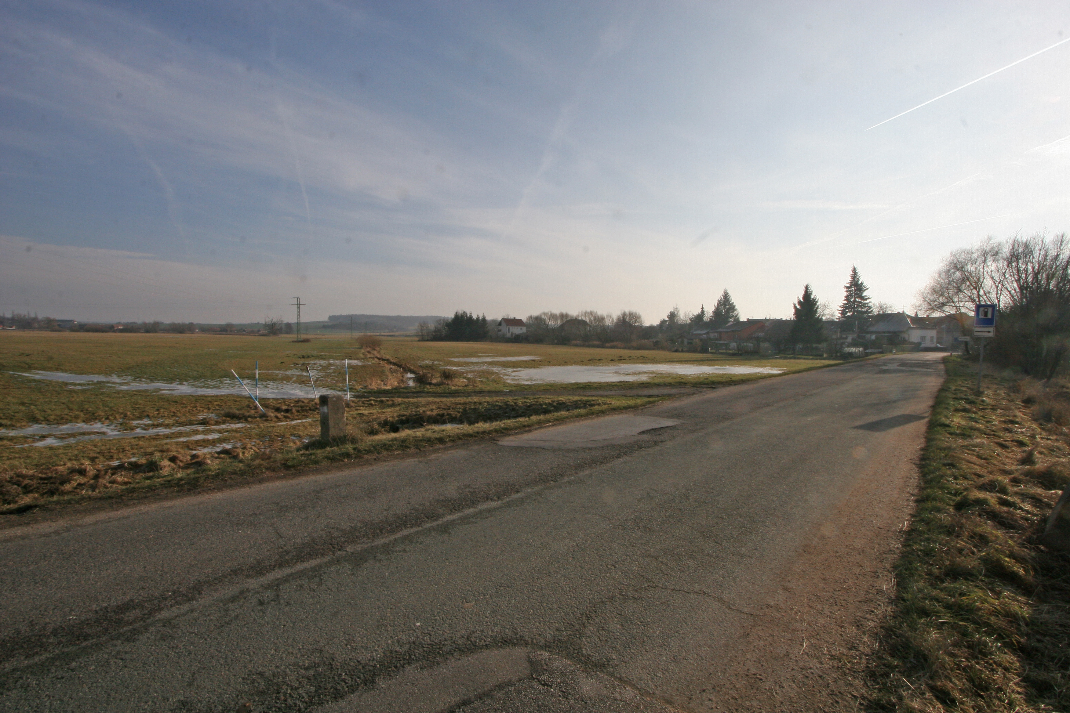 Nechanice pohled při příjezdu od Komárova